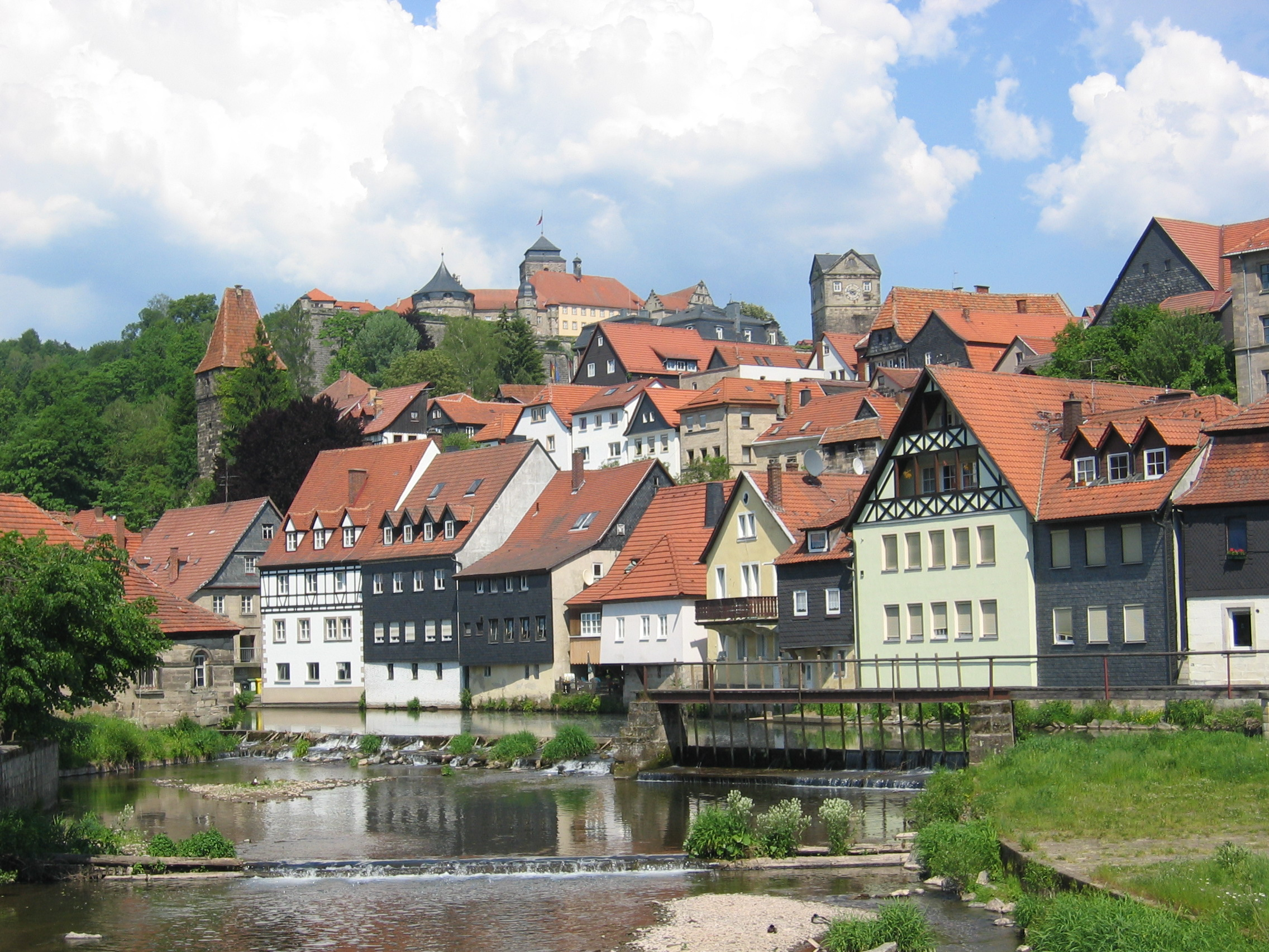 Kronach Stadtaufbau an der Haßlach mit Festung Rosenberg